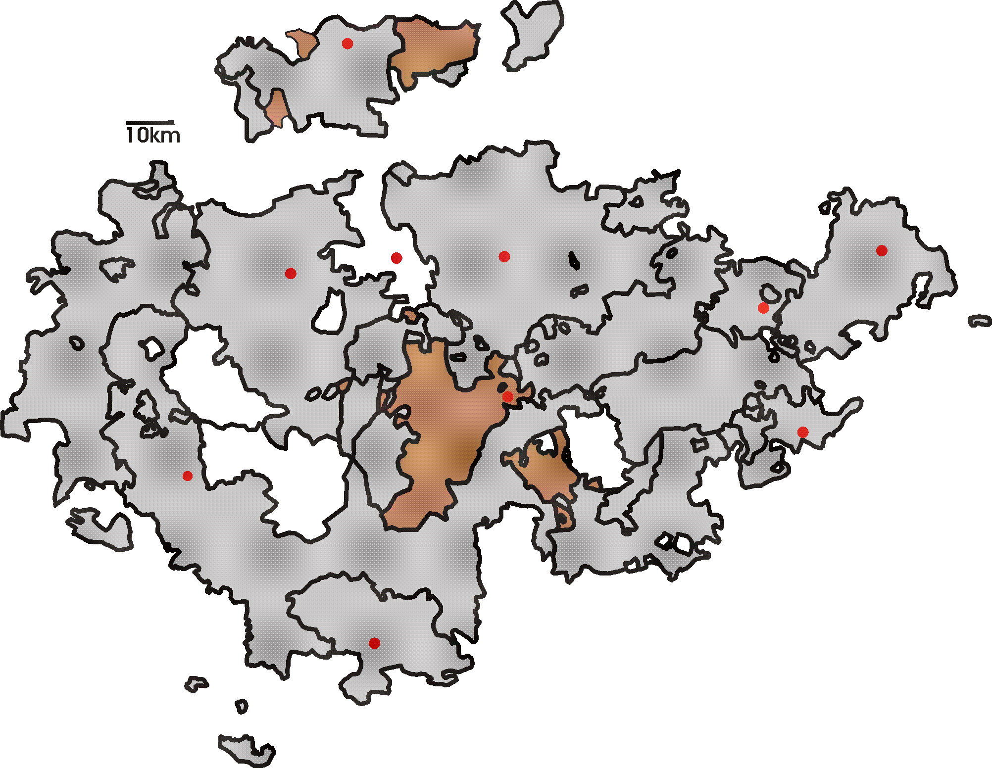 Karte Thüringen 1900 mit Fürstentum Schwarzburg-Rudolstadt